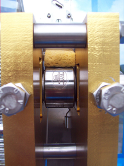 Motivwalze von einm Medaillenpräger